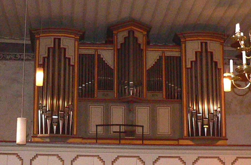 Evangelische Kirche St. Laurentius in Dassel, Niedersachsen, Deutschland - Orgelempore